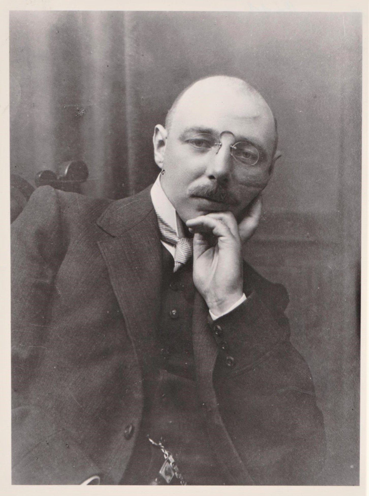 Porträtfoto von Dr. Kurt Neubert